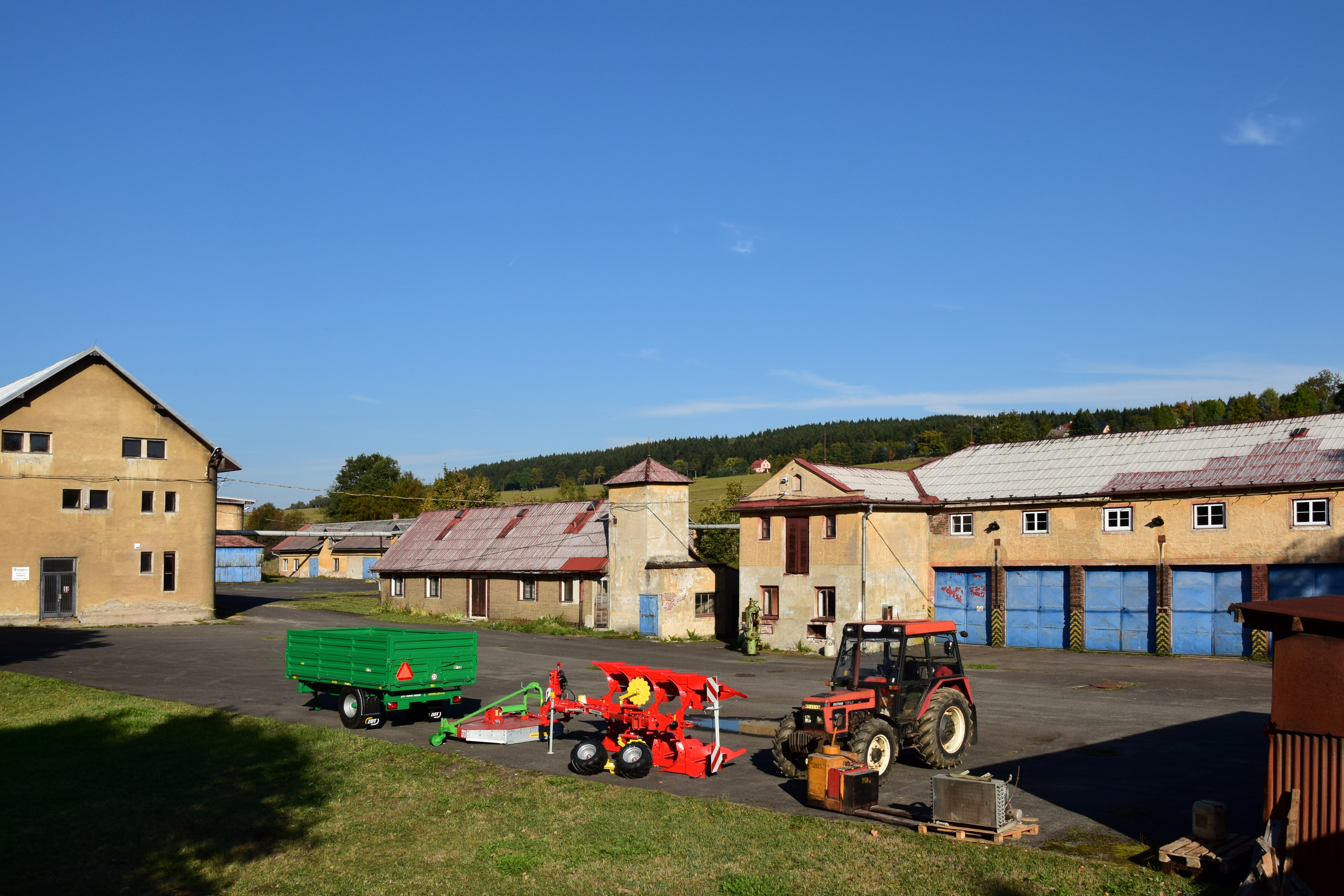 Kovářská – areál firmy Elektropřístroj